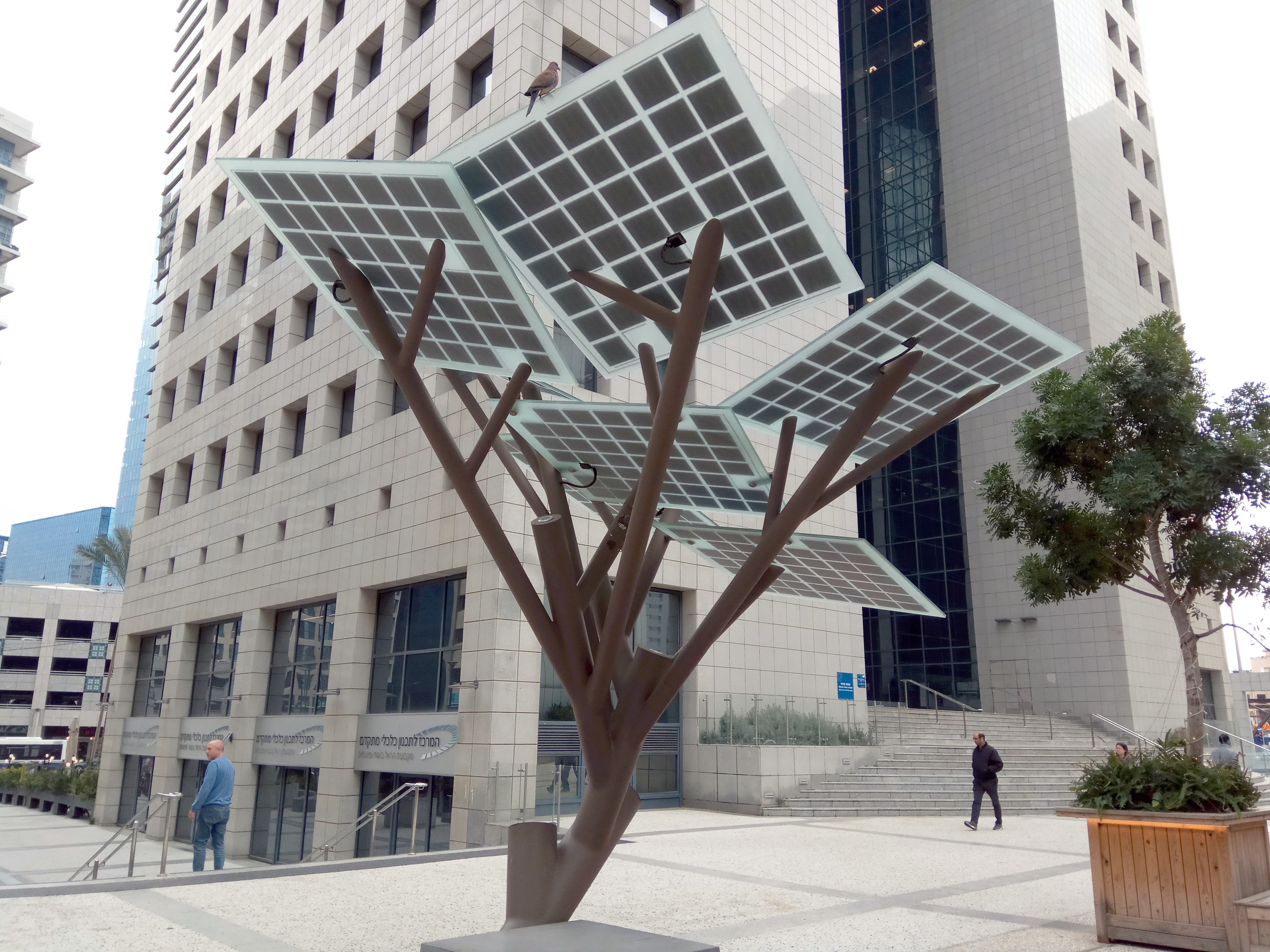 עץ סולרי במתחם הבורסה ברמת גן